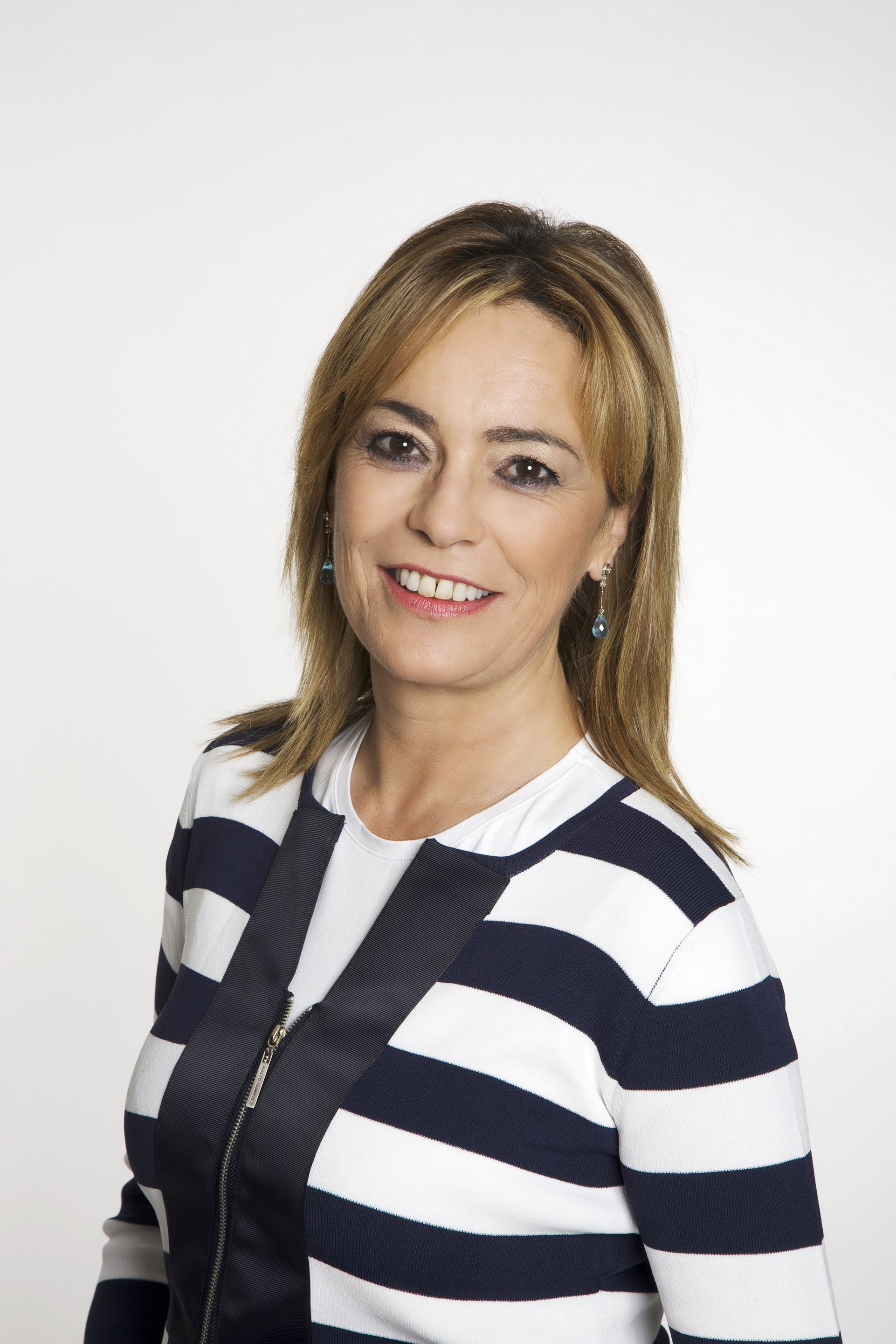 Ángela Vallina, candidata a la alcaldía de Castrillón